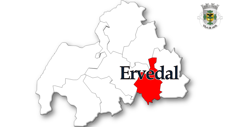 Evolução da População